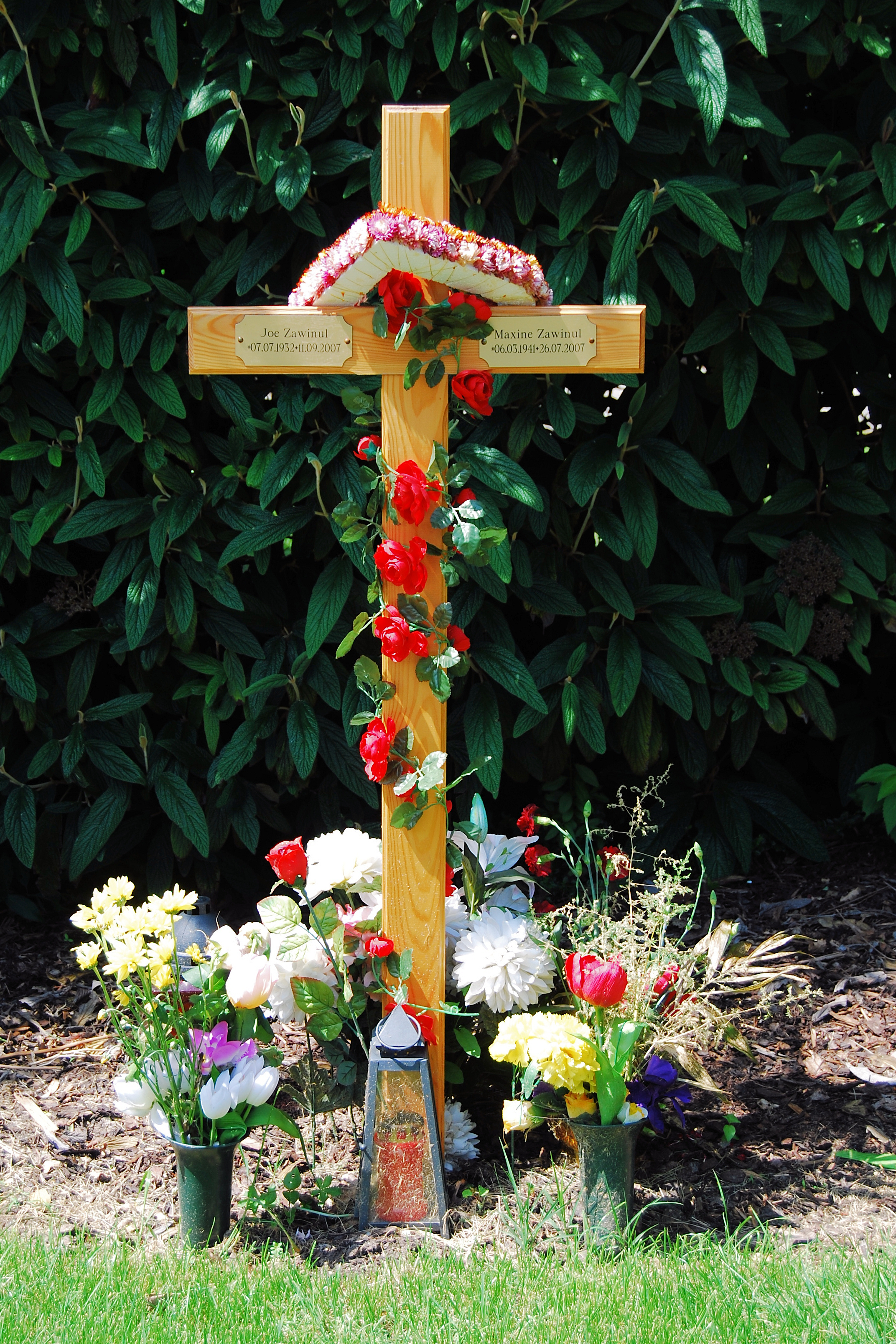 Grab Joe Zawinul, Wiener Zentralfriedhof